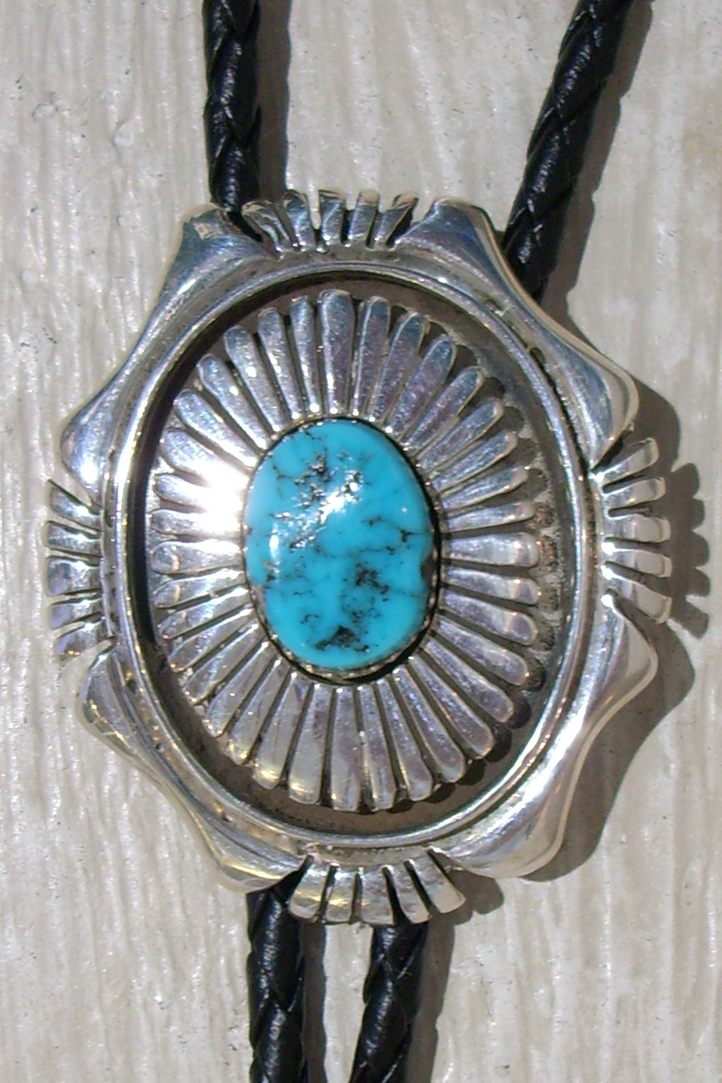 Bolotie, Silber mit Türkis, Navajo-Indianer